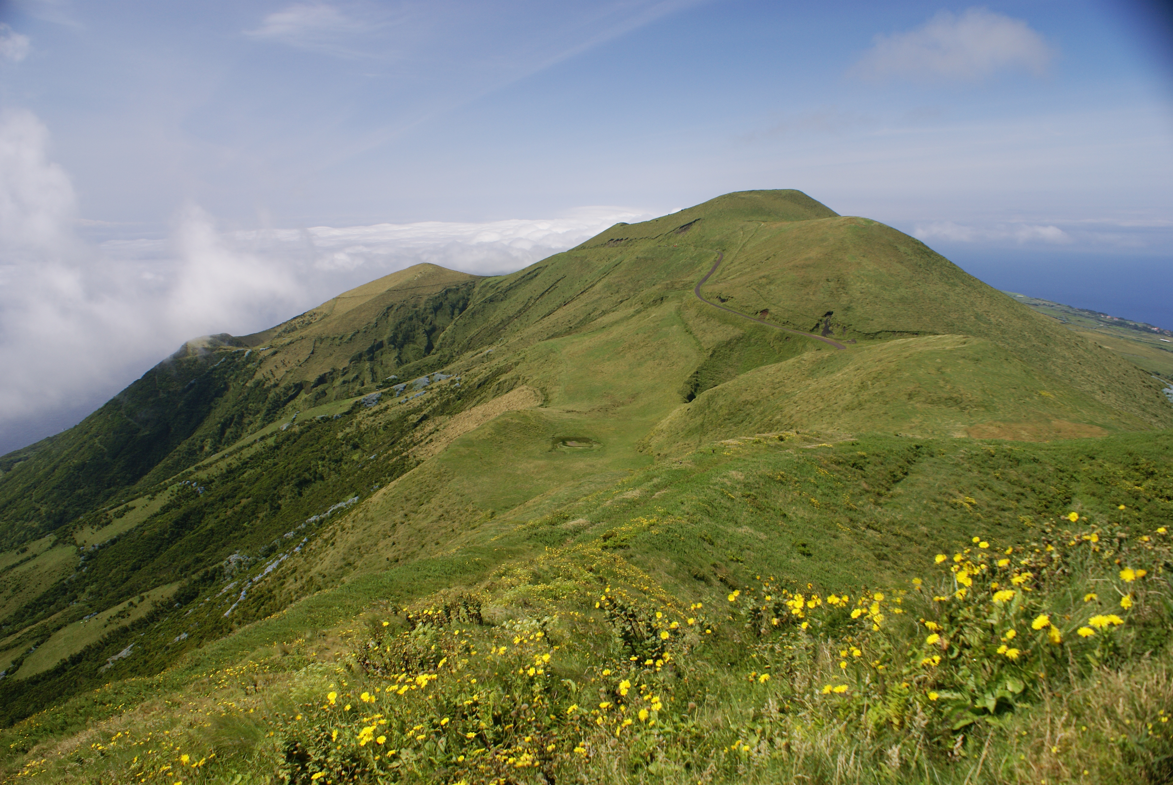 Montanhas da cordilheira central da ilha de São Jorge, vista do cimo do Pico da Esperança, Norte Grande, Velas, ilha de São Jorge, Açores